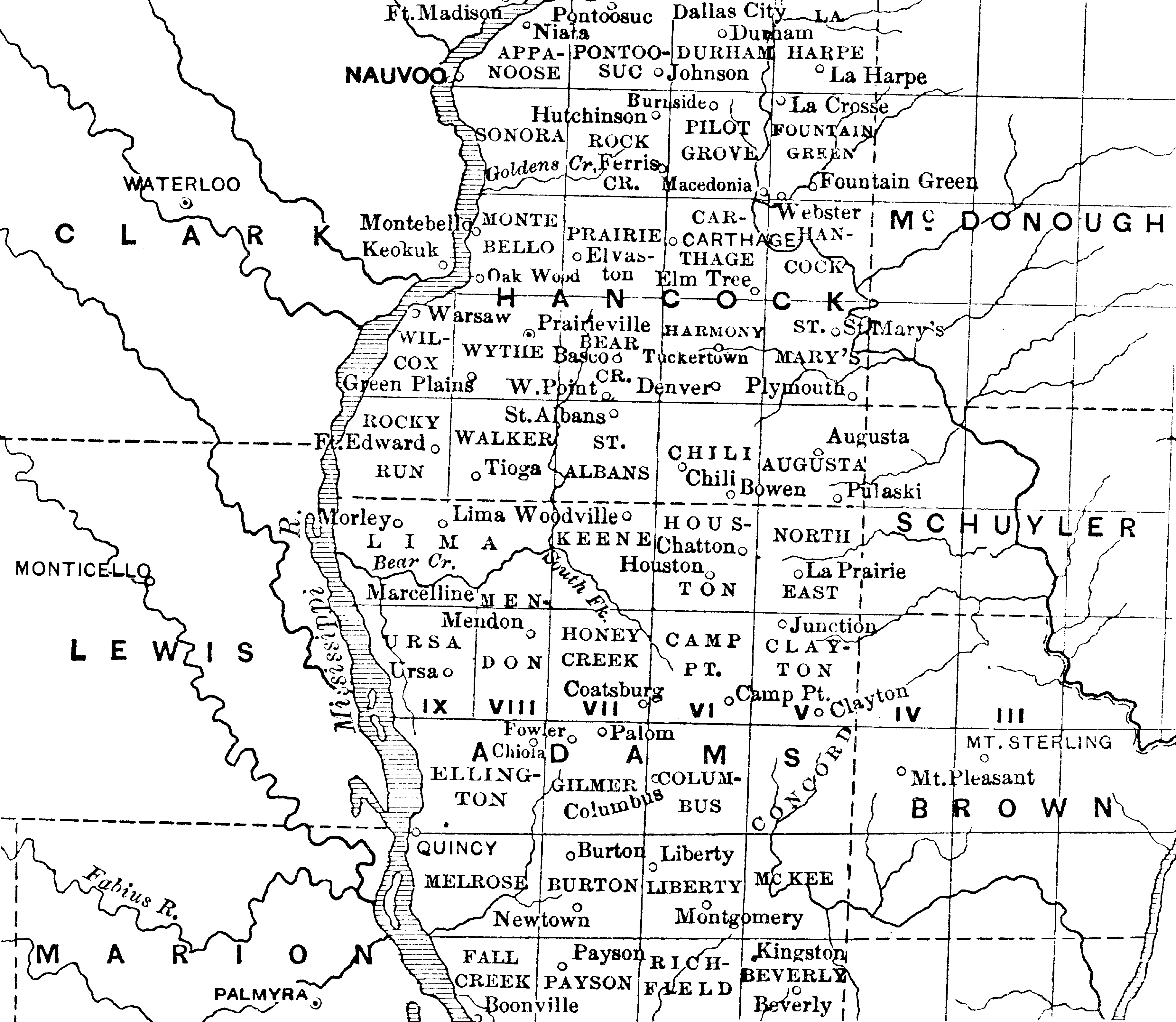 Settlements in Illinois.